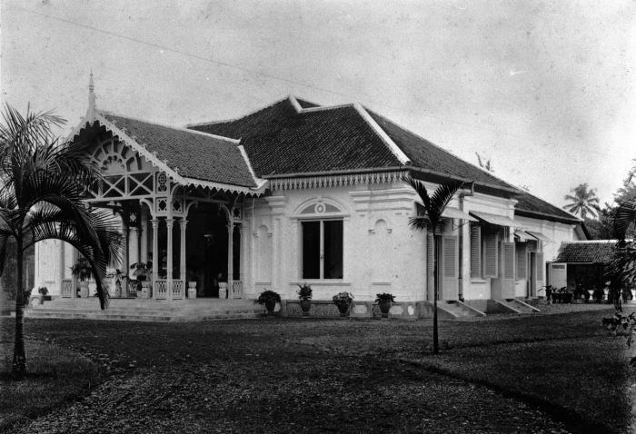 Foto. De woning van de administrateur van de suikerfabriek 'Poerwokerto' op Midden-Java